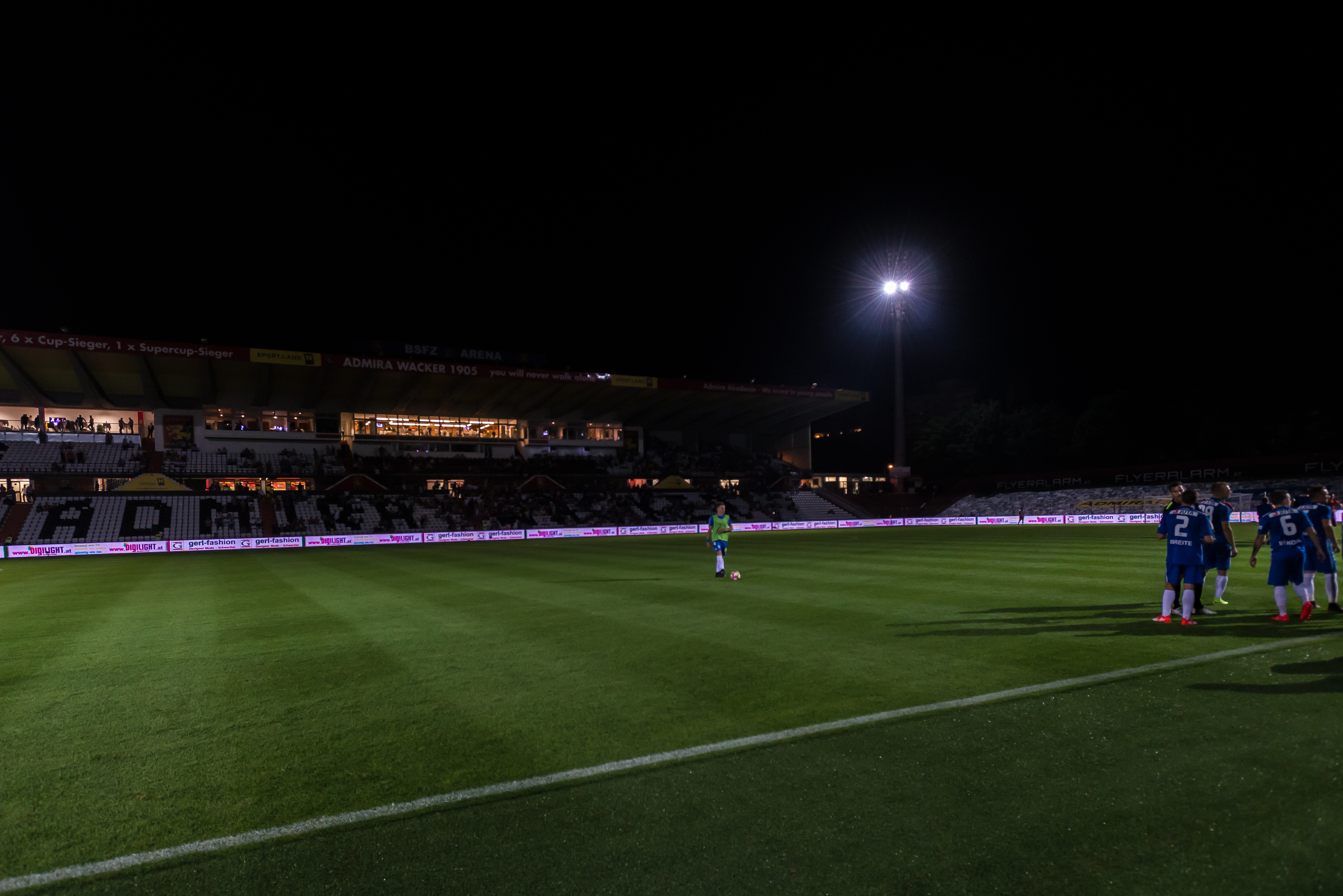 20160728 Europa League - FC Admira Wacker Moedling vs FC Slovan Liberec. Bild zeigt Ausfall der Flutlichtanlage.